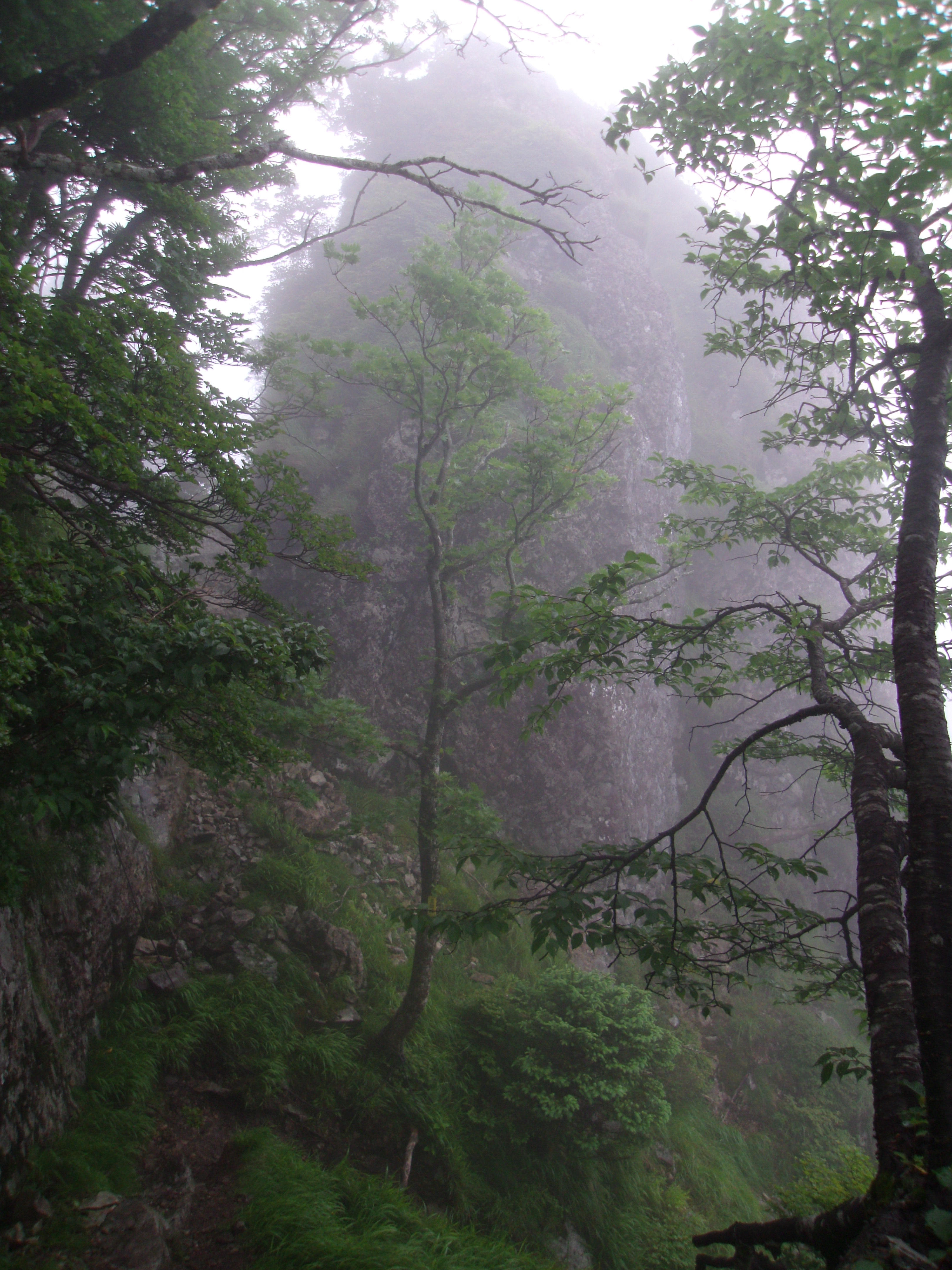 大峯奥駈道第47靡「五鈷嶺」